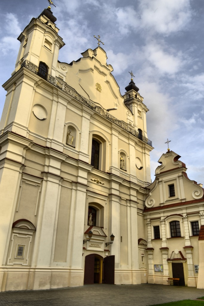 Беларуская (тарашкевіца): Ансамбль былога кляштара францысканцаў у межах агароджыдэкаратыўнае ўбраньне касьцёла:6 алтароў са скульптурай амбонроспісы скляпеньняў2 фрэскі ў бакавых алтарах. г. Пінск This is a photo of Belarusian heritage monument. Reference number: 111Г000538 ( WLM)